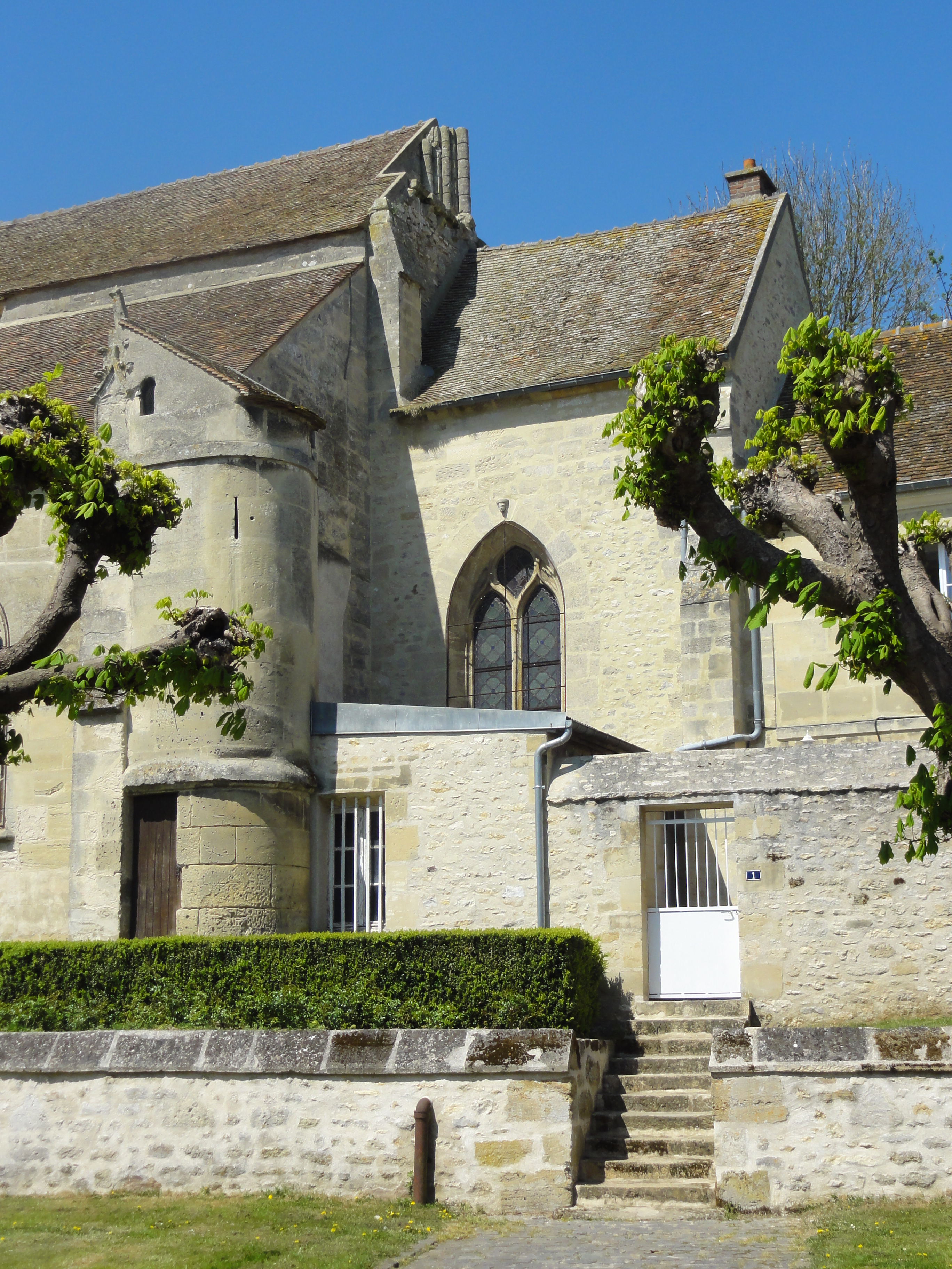 Église Saint-Martin de Commeny (voir titre).